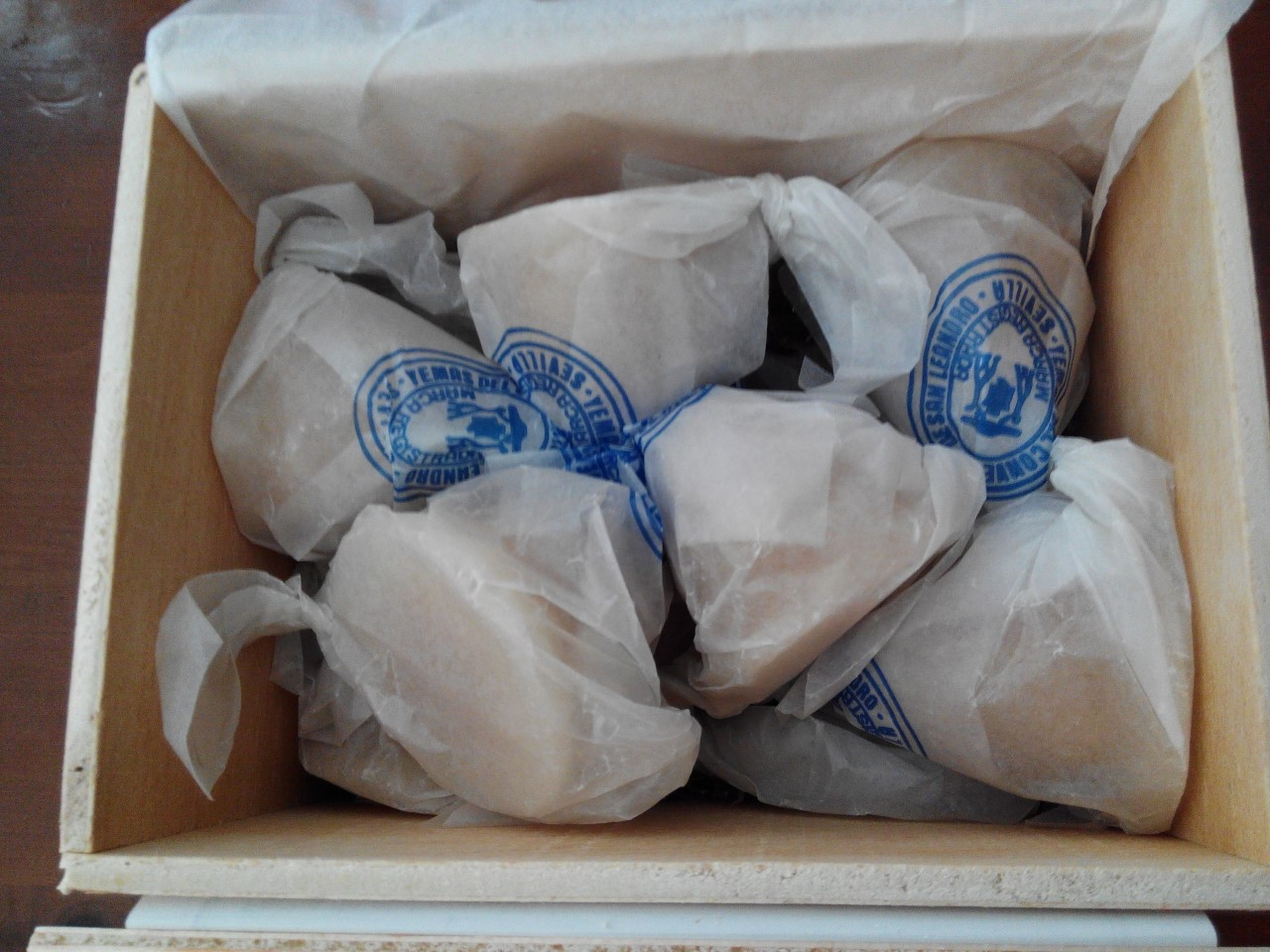 Fotografía de una caja de Yemas de San Leandro, dulce conventual que elaboran las monjas agustinas del Convento de San Leandro en Sevilla, Andalucía, España.